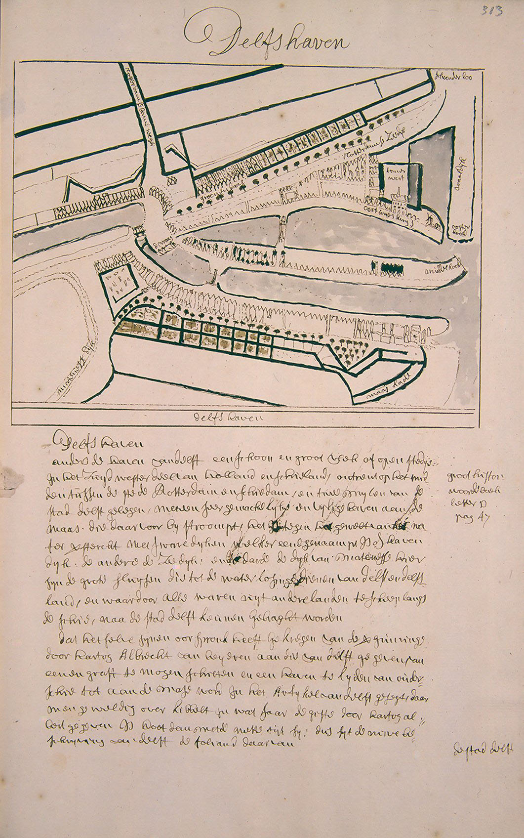 Beschrijving en Afbeelding der Steeden Dorpen Gehugten Aadelijke En Andere Gebouwen In Zuijt Holland en Aankleving van Dien Meest naat leeven getekeent. en Naat A.B.C. gelegt Dus Beschreeven en bij een Versaamelt Door Andries Schoemaker 1730